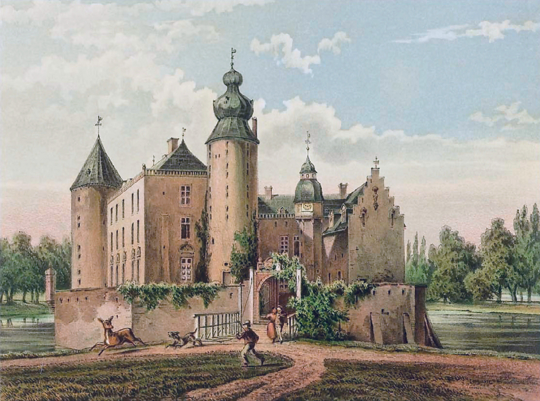 Lithograph of Schloss Gemen in Borken, Kreis Borken, Germany